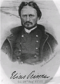 Elias Peissner (1825-1863)